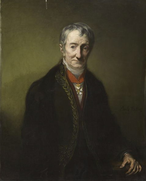 Portrait d'Alexandre Brongniart, directeur de la Manufacture de Sèvres